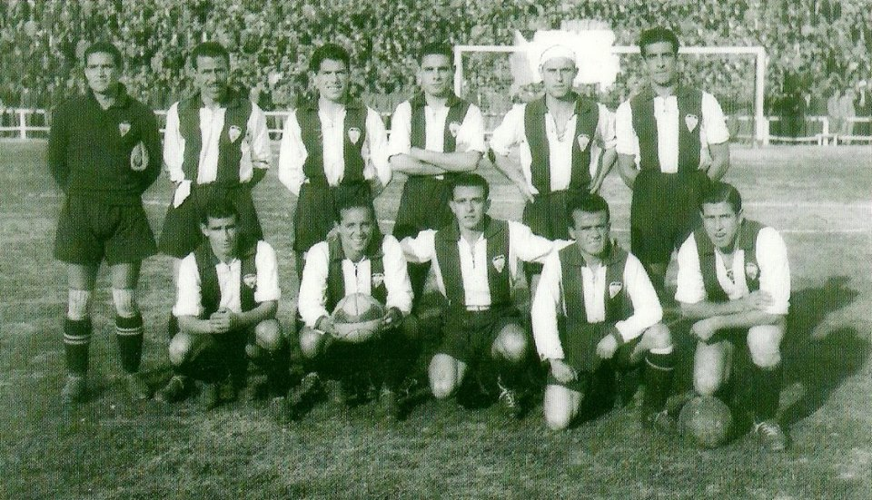 Plantilla CD Alcoyano 1945 1º Divisón